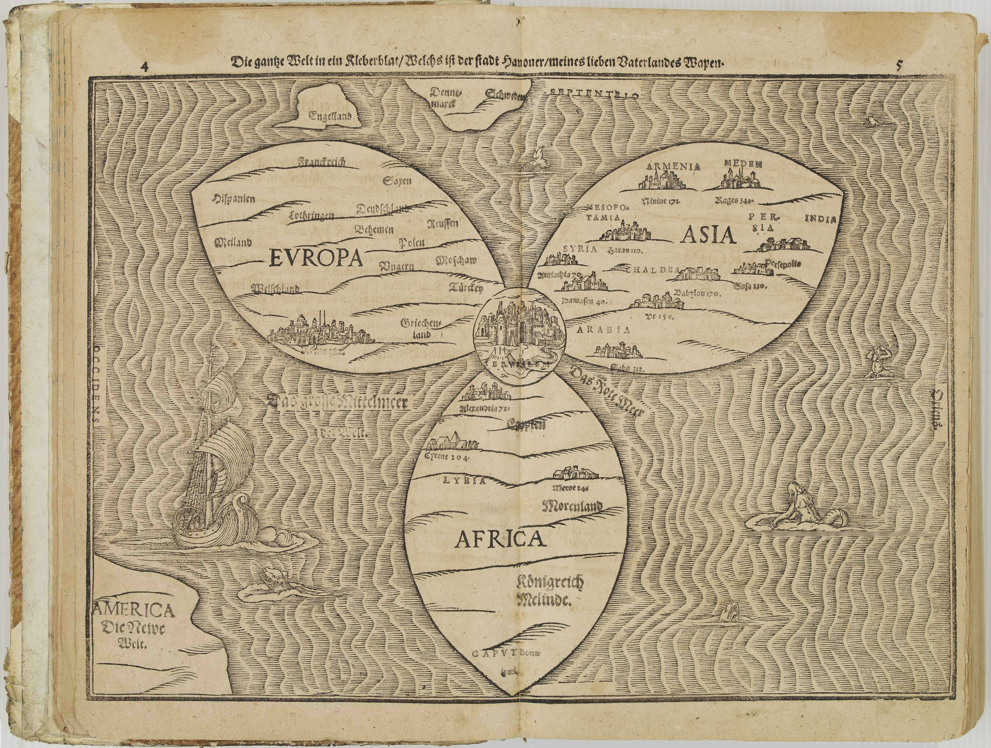 Donat, Magdeburg